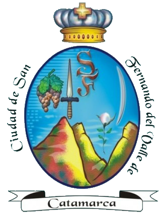 Escudo de la Municipalidad de San Fernando del Valle de Catamarca. Tamaño pequeño